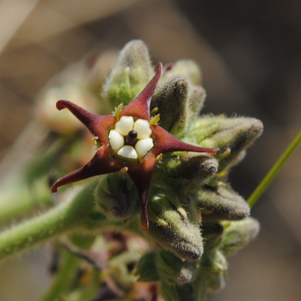 Oxypetalum arnottianum. Apocynaceae. Fotos tomadas en ladera del Cerro Miriñaque entre gramíneas, departamento de Rivera y en suelo arenoso al margen del Lago de Palmar, departamento de Soriano, Uruguay.